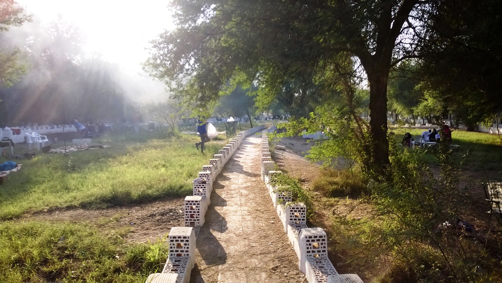 Al Dosari Zoo & Natural Reserves -QATAR